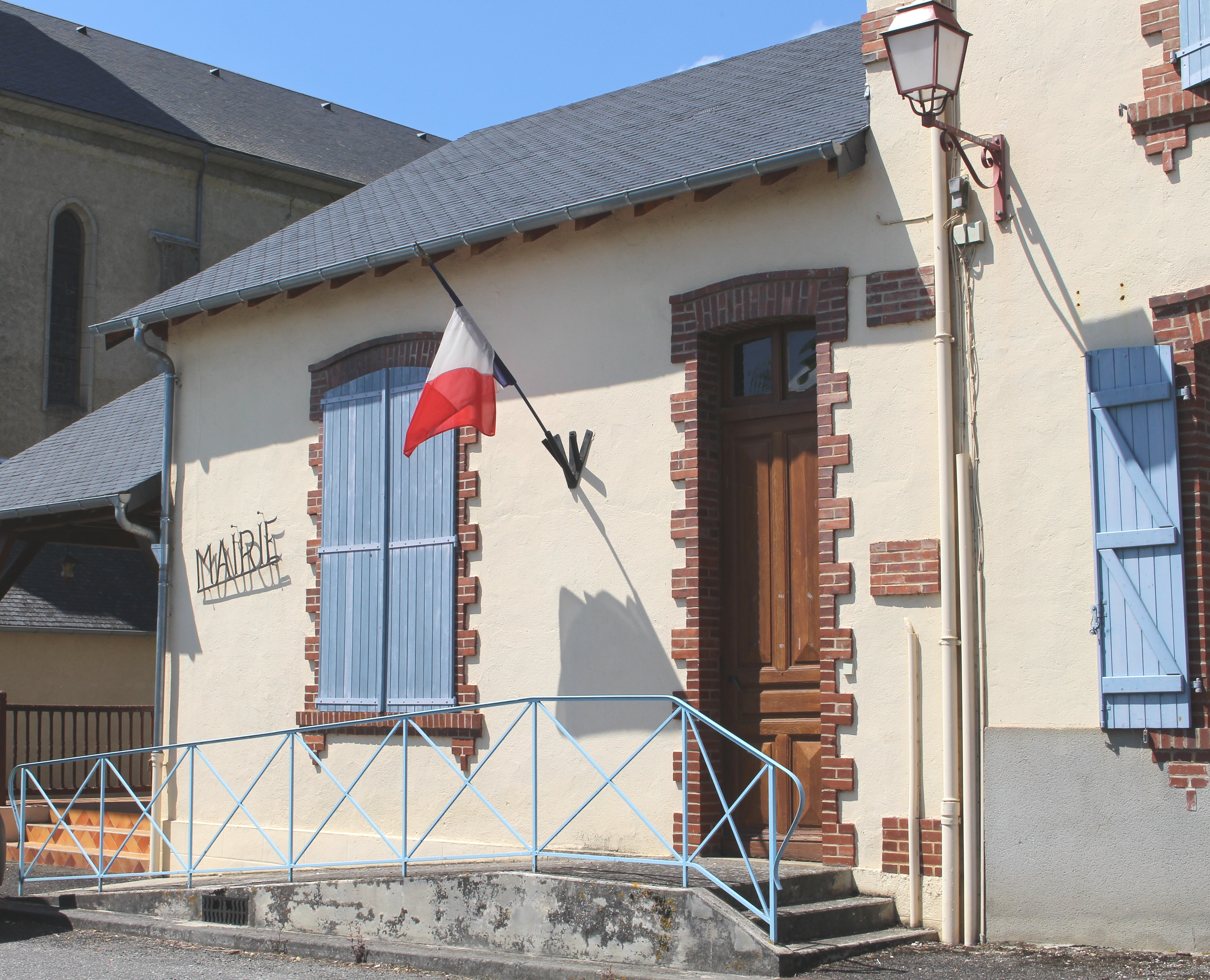 Mairie de Libaros (Hautes-Pyrénées)